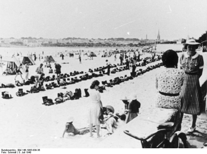 Deutsche Soldaten am Badestrand des französischen Seebades Royan. Royan, Frankreich.